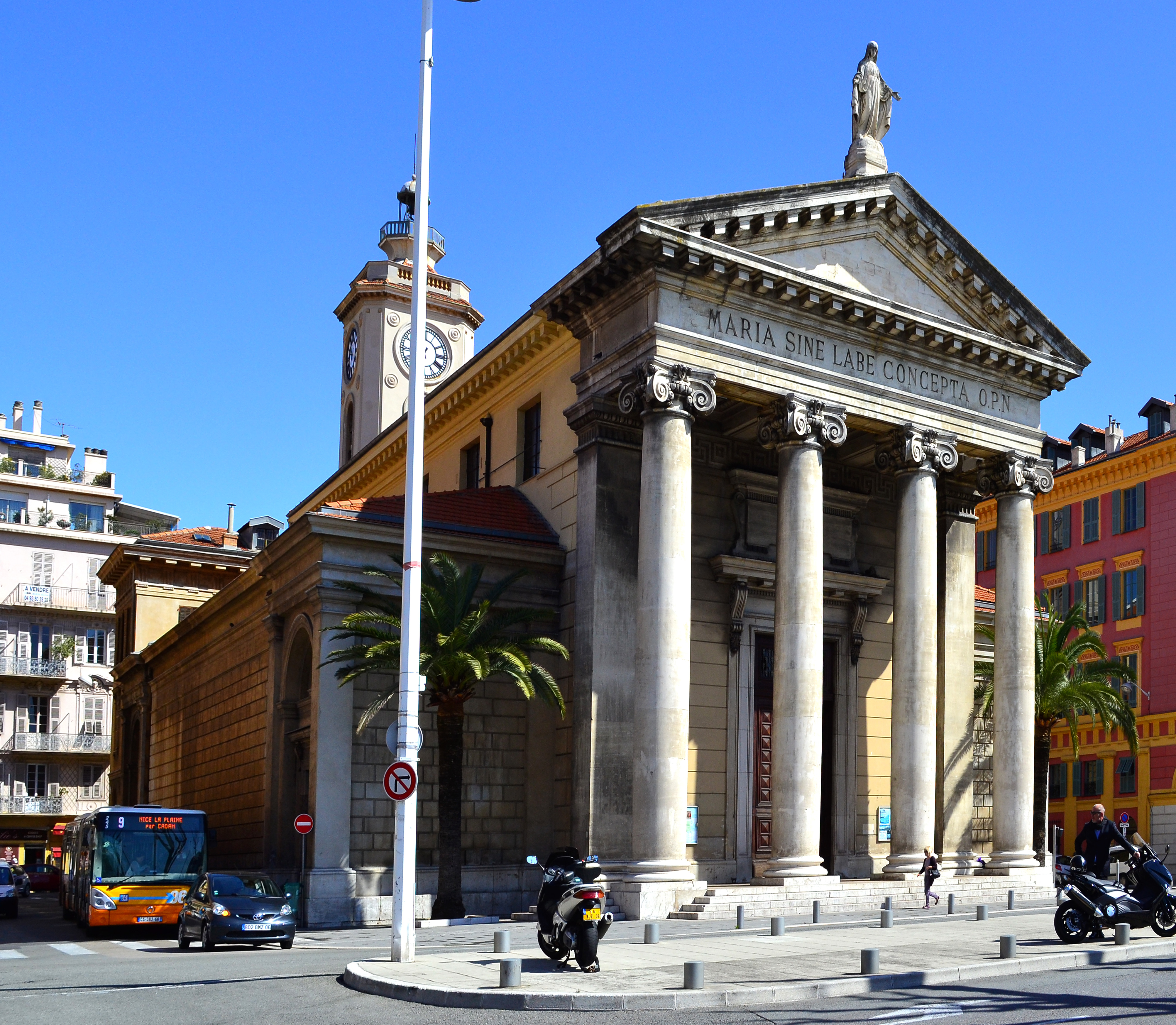 Eglise de l'Immaculé Conception